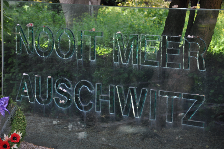 Auschwitz-monument Locatie: Wertheimpark, Amsterdam Kunstenaar: Jan Wolkers (1925-2007) Jaartal: 1993; Materiaal: Glas, spiegels Foto © Gus Maussen